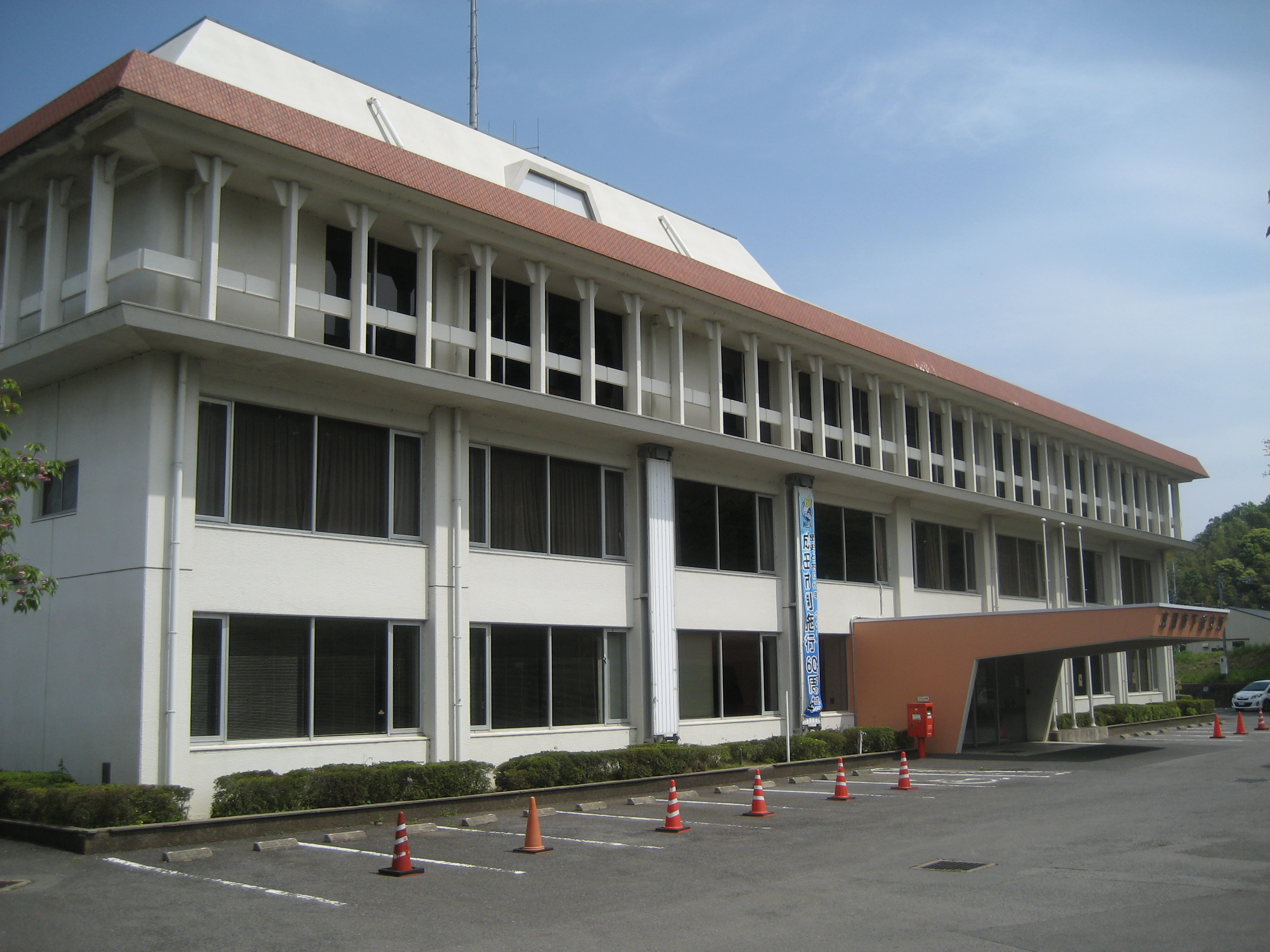 成田市役所下総支所庁舎（旧下総町役場庁舎）